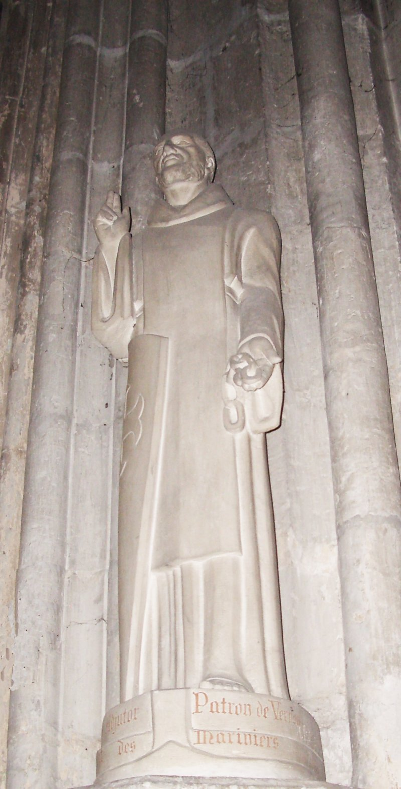 La statue de St Adjutor dans la collégiale de Vernon